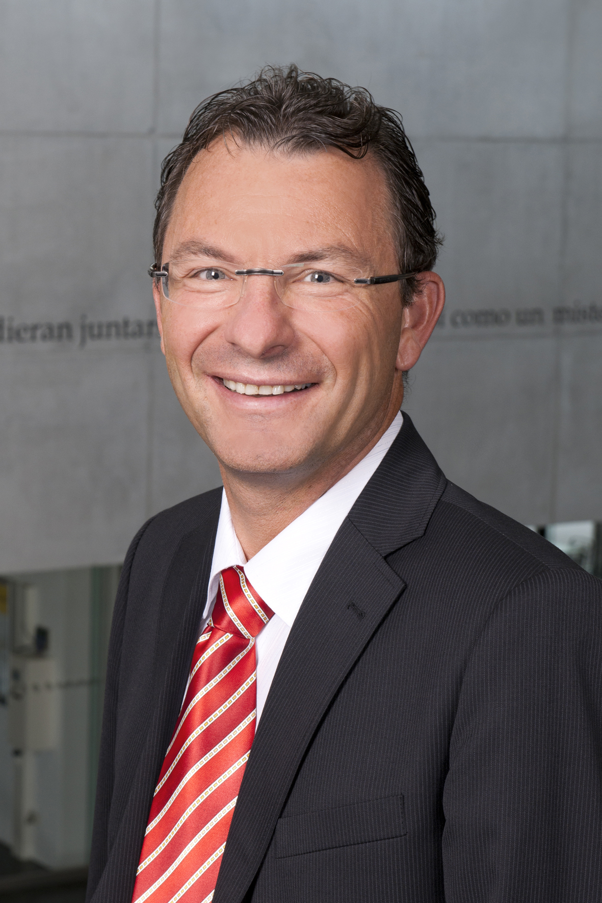 Portrait Geschäftsführer FH Kufstein Thomas Madritsch